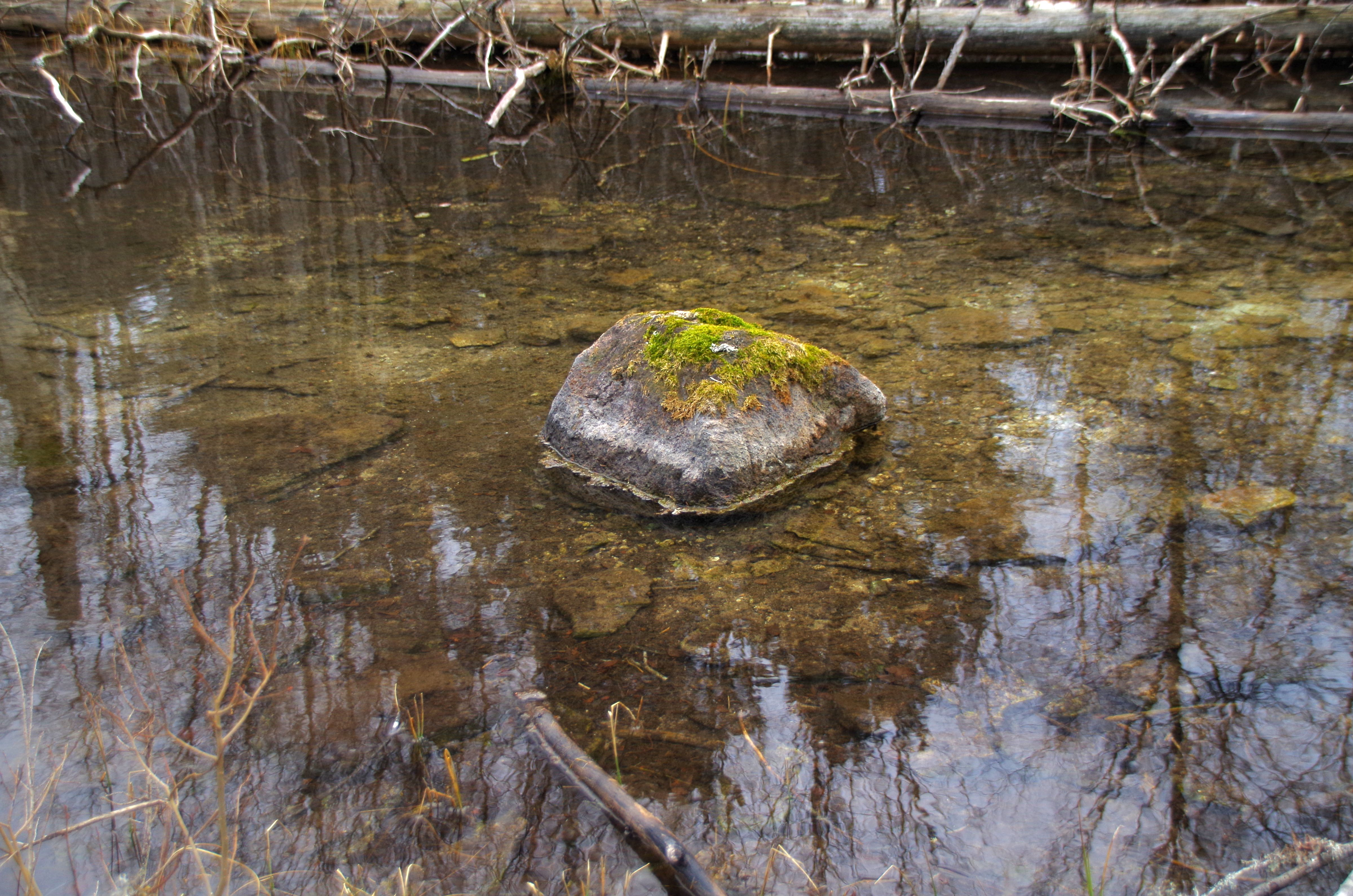 Neitsipere allikad (ka Neitsijärve allikad) on kaitsealused allikad Rapla maakonnas Märjamaa vallas Lümandu mõisa lähedal.